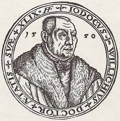 Bildnis Jodocus Willich (1501–1552)